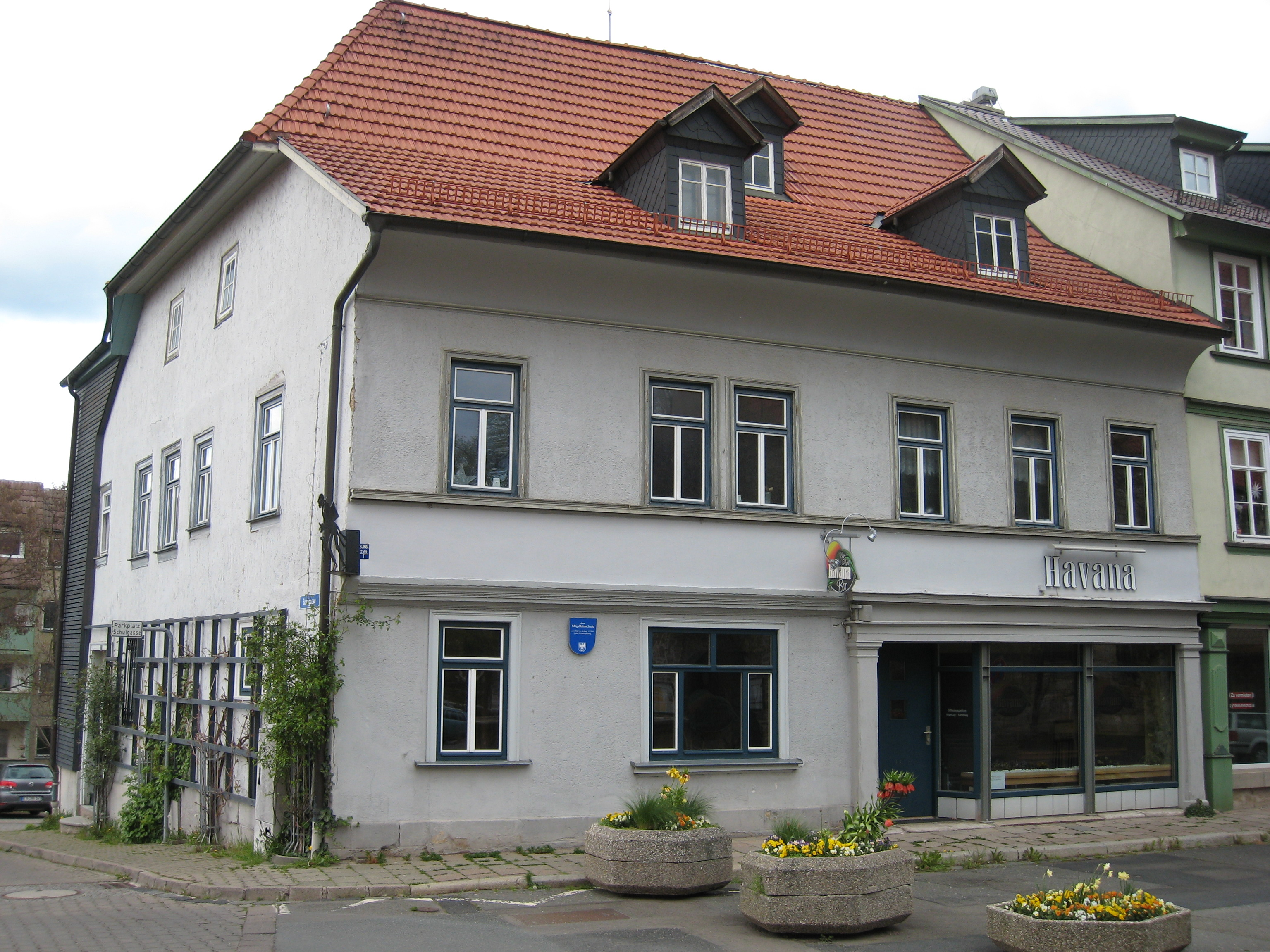 Alte Mägdleinschule in Arnstadt (Schulgasse 1).